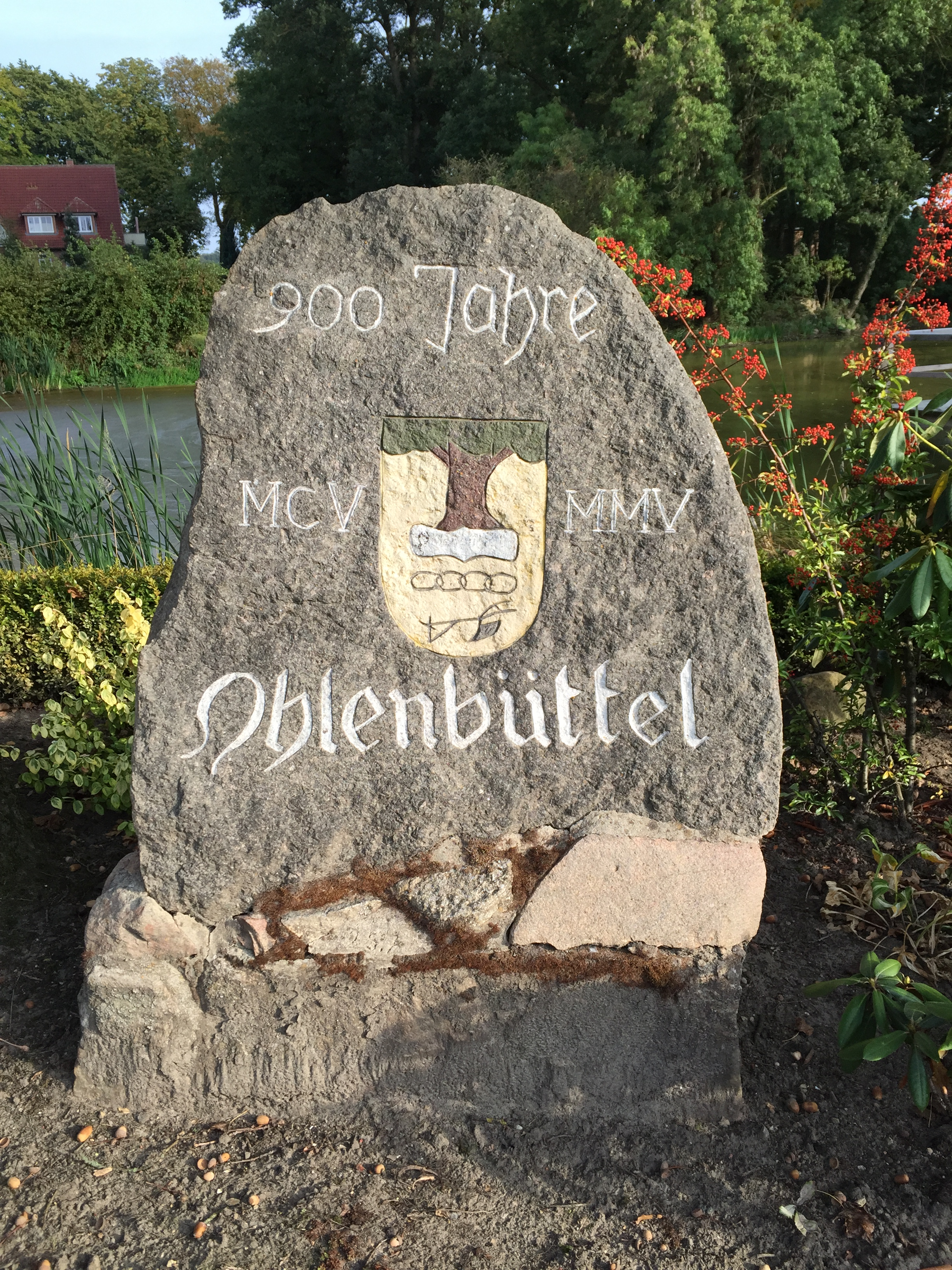 Gedenkstein 900 Jahre Ohlenbüttel 1105-2005